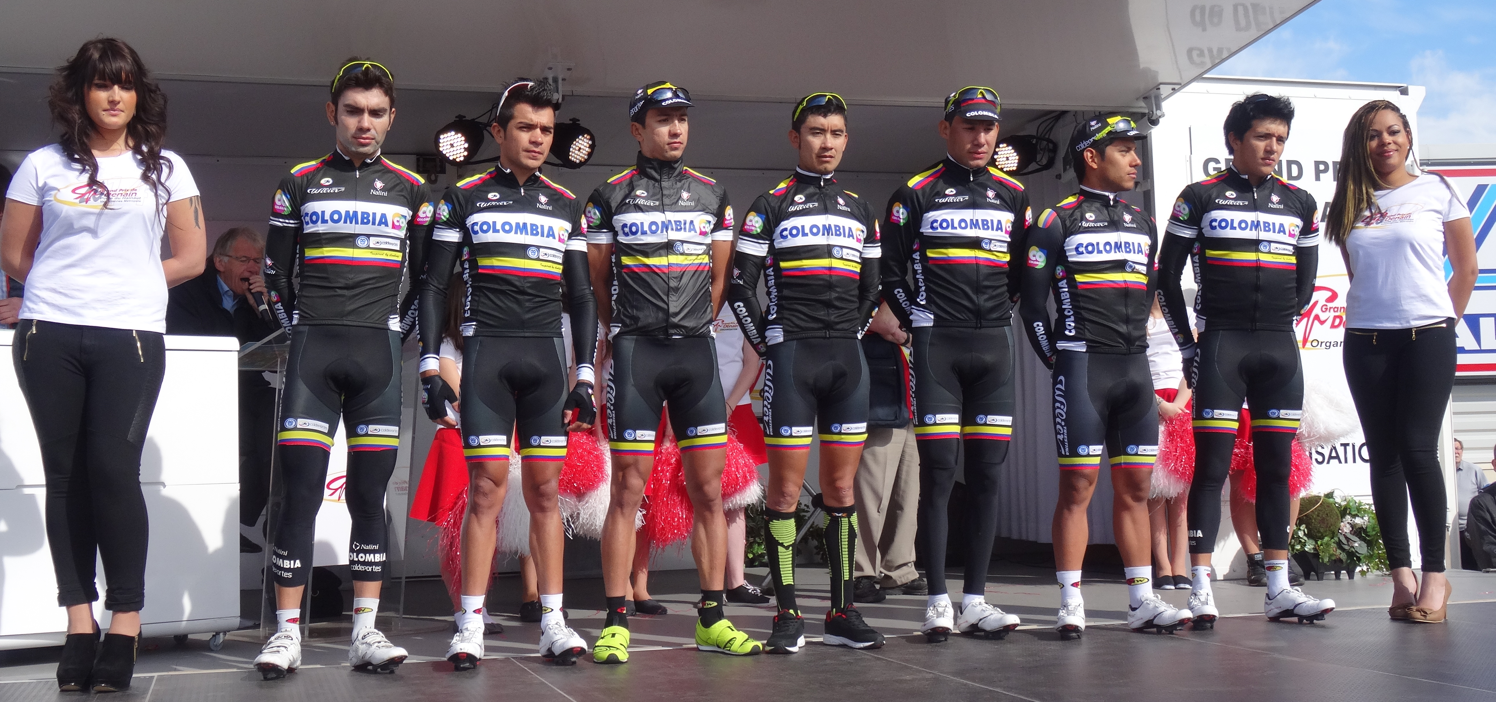 Reportage réalisé le jeudi 17 avril à l'occasion du départ et de l'arrivée du Grand Prix de Denain 2014 à Denain, Nord, Nord-Pas-de-Calais, France.